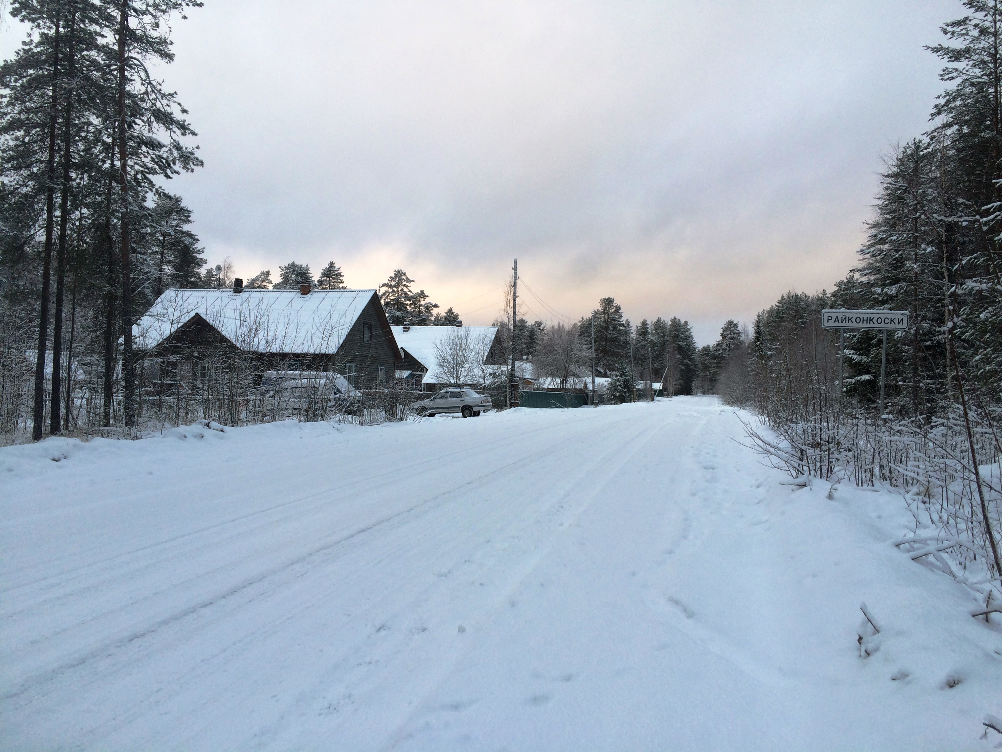 Райконкоски пос.